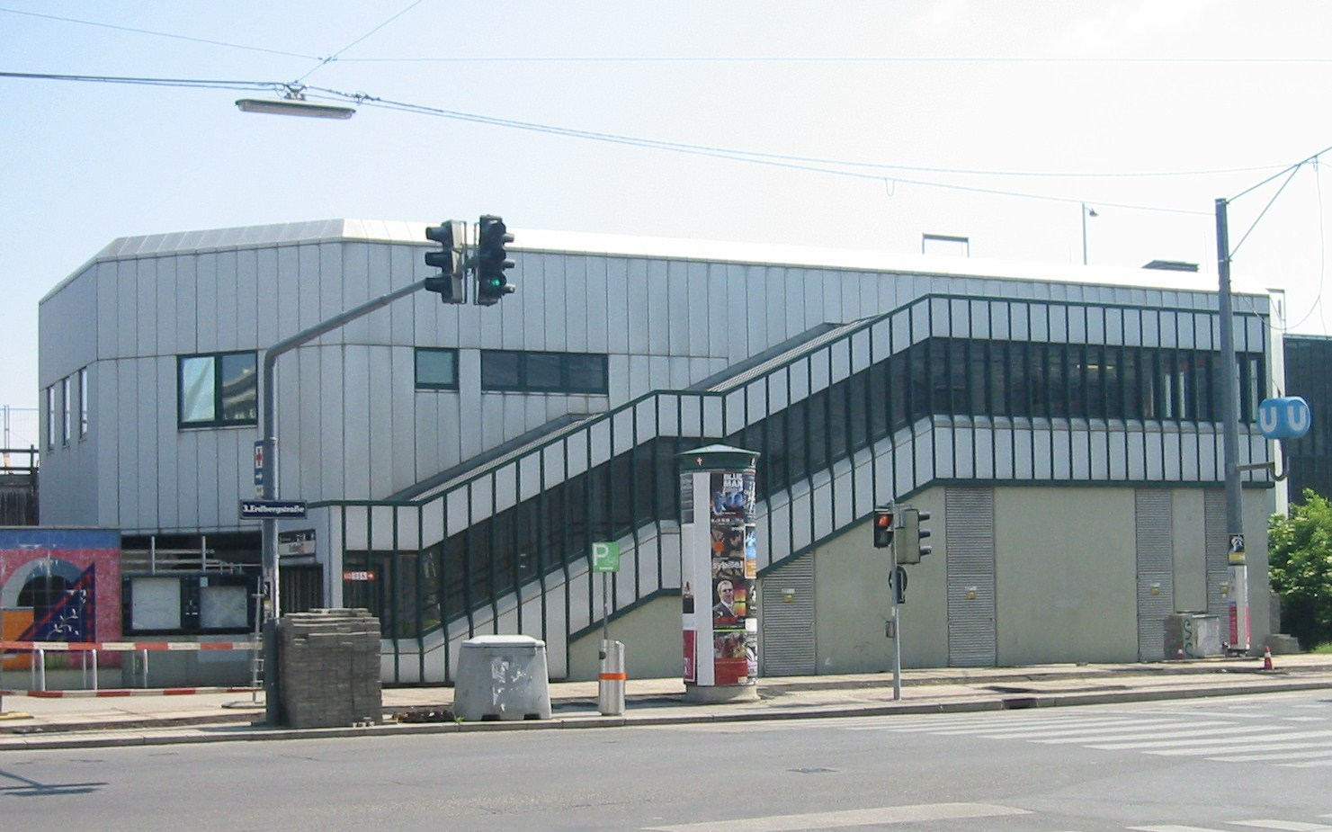 Wien U3 Erdberg